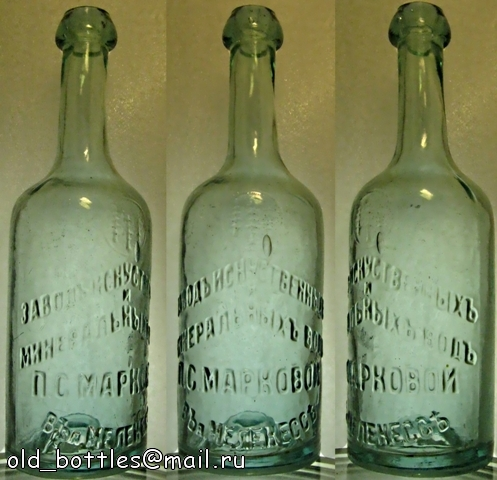 Старые бутылки из-под минеральной воды завода Марковой.jpg